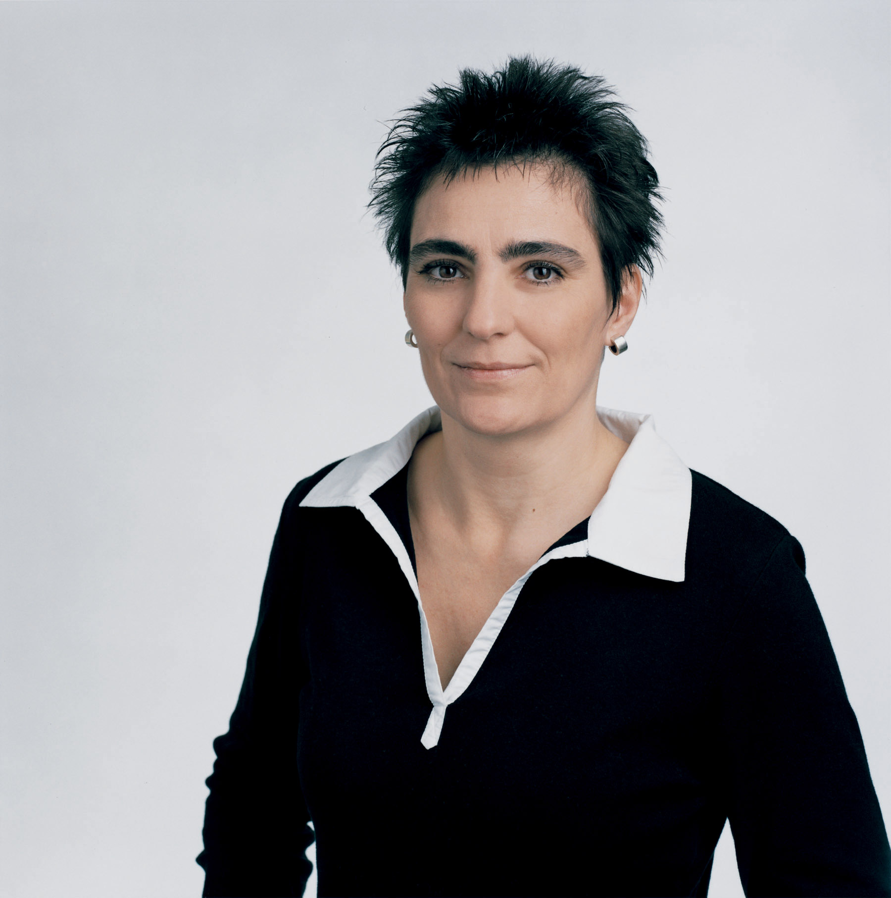 Claudia Sommer-Smolik. Wiener Landtagsabgeordnete und Mitglied des Wiener Gemeinderats